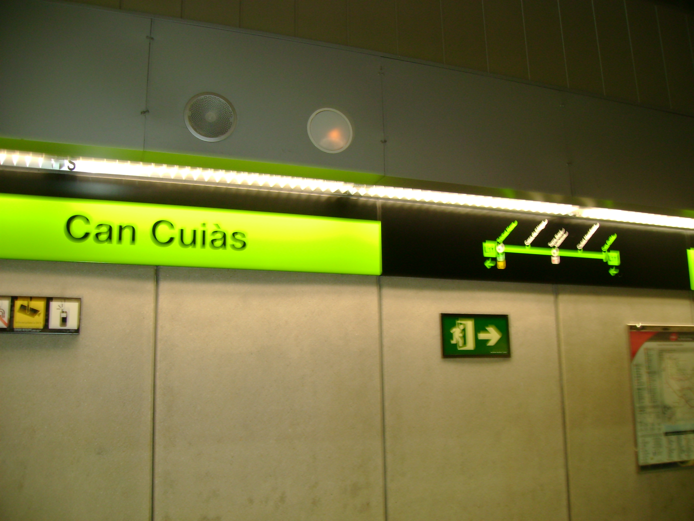 Foto capturada per la meva càmara a l'estació de Can Cuiàs (Metro de Barcelona).